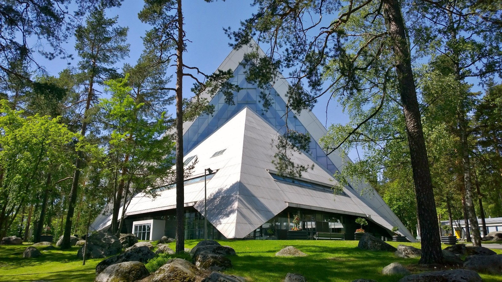 Kuva Aarno Ruusuvuoren suunnittelemasta Hyvinkään kirkosta, 1961. Kuva otettu 11.6.2015.